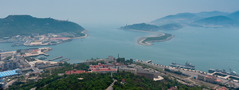 Lüshunkou mit Militärhafen